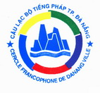 Embleme du Cercle Francophone de Danang